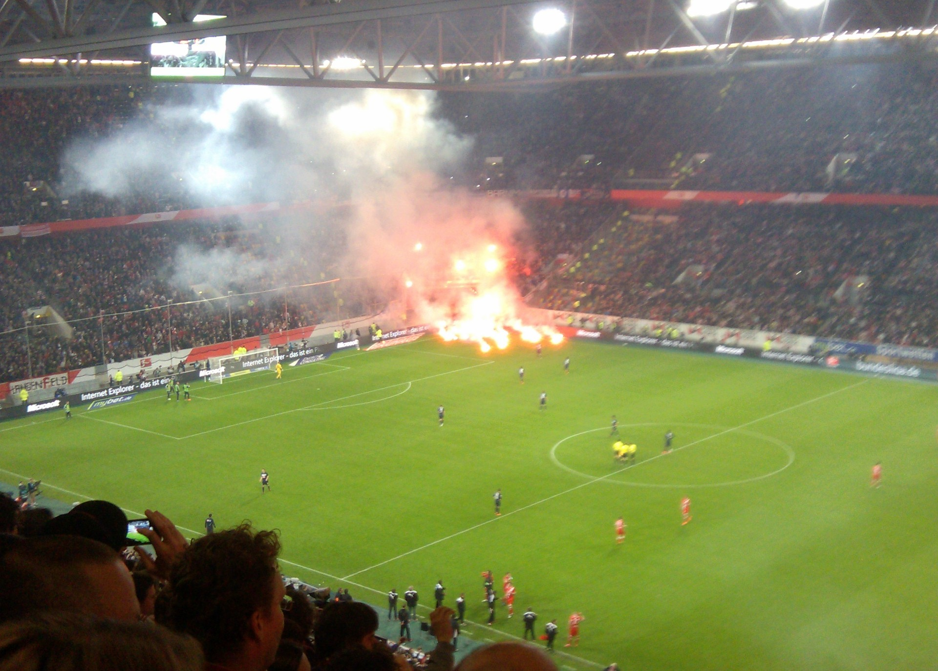 Fußballrelegationsspiel zwischen Fortuna Düsseldorf und Hertha BSC Berlin am 15.5.2012 im Düsseldorfer Stadion, Ca. 62. Spielminute. Im Bild der Auswärtsfanblock, aus dem zahlreiche Brandkörper auf das Spielfeld geworfen wurden.